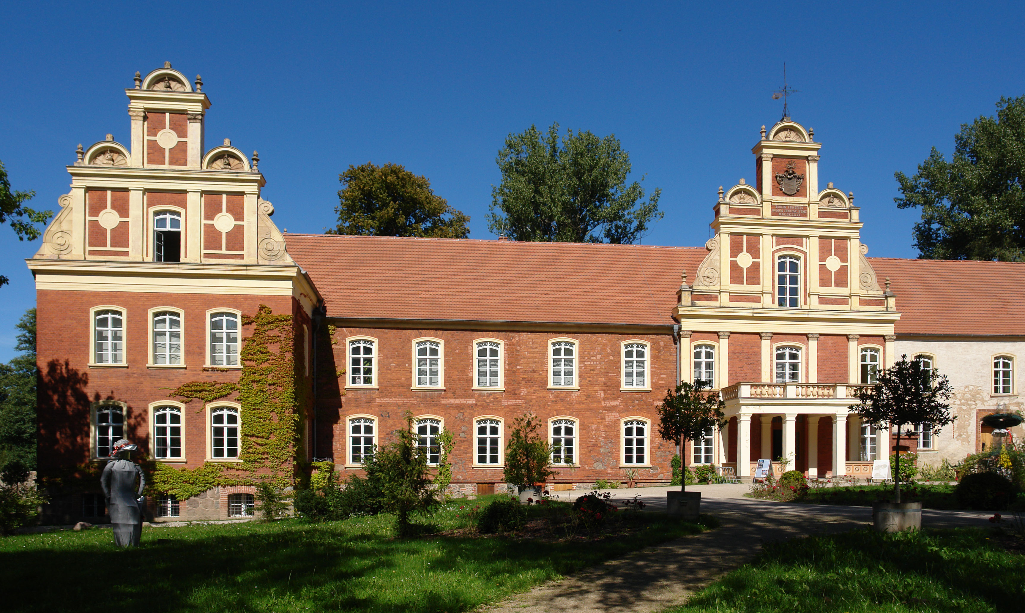 Schloss Meyenburg